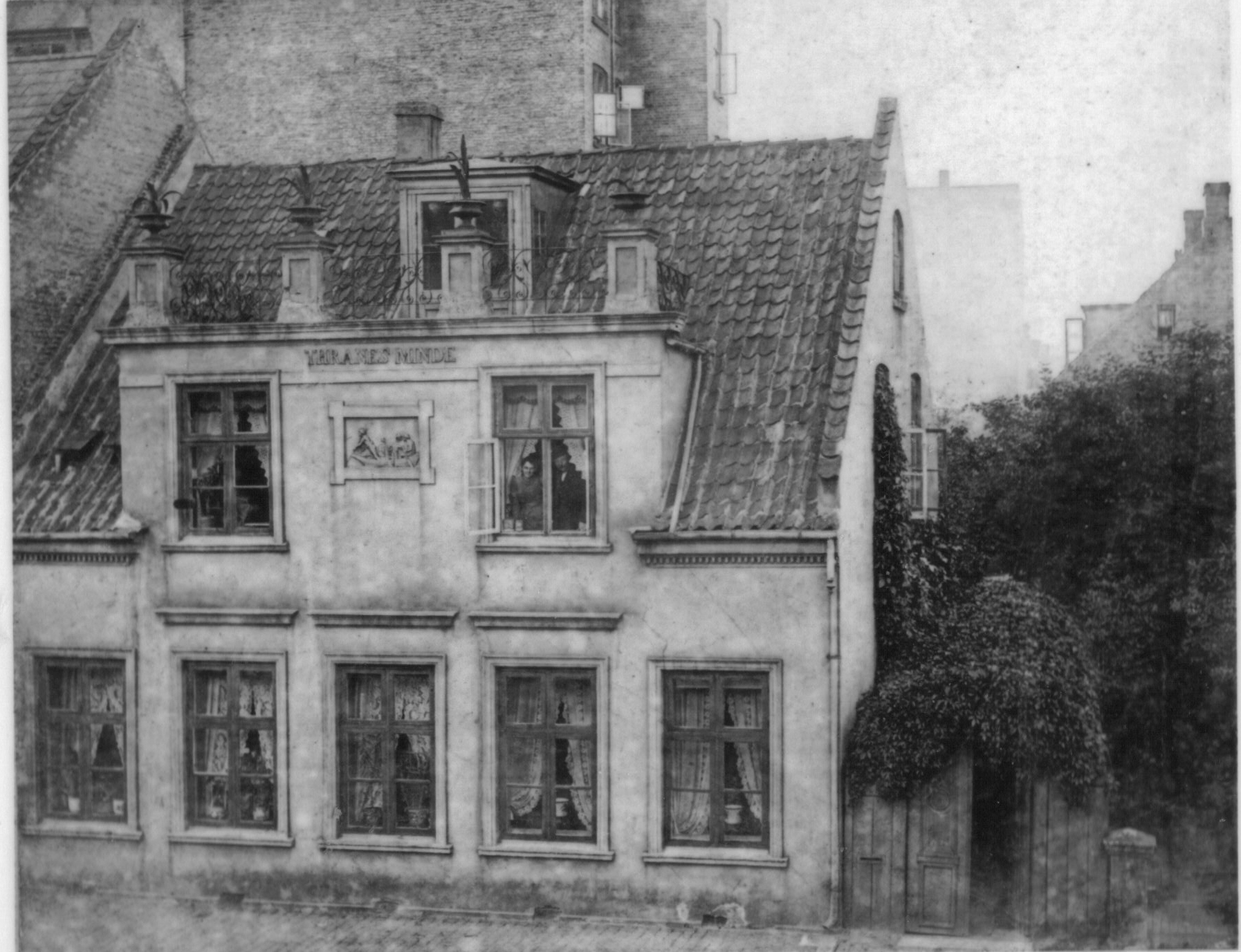 Villa på Nørrebro